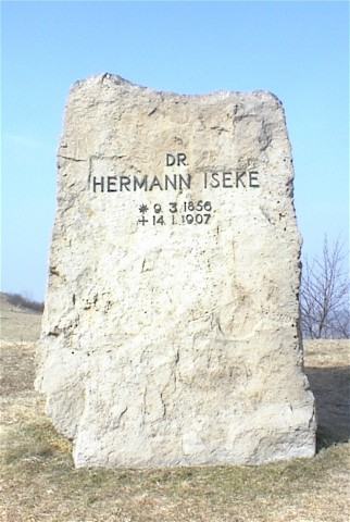 Der Gedenkstein zu Ehren von Dr. Hermann Iseke bei Holungen im Eichsfeld